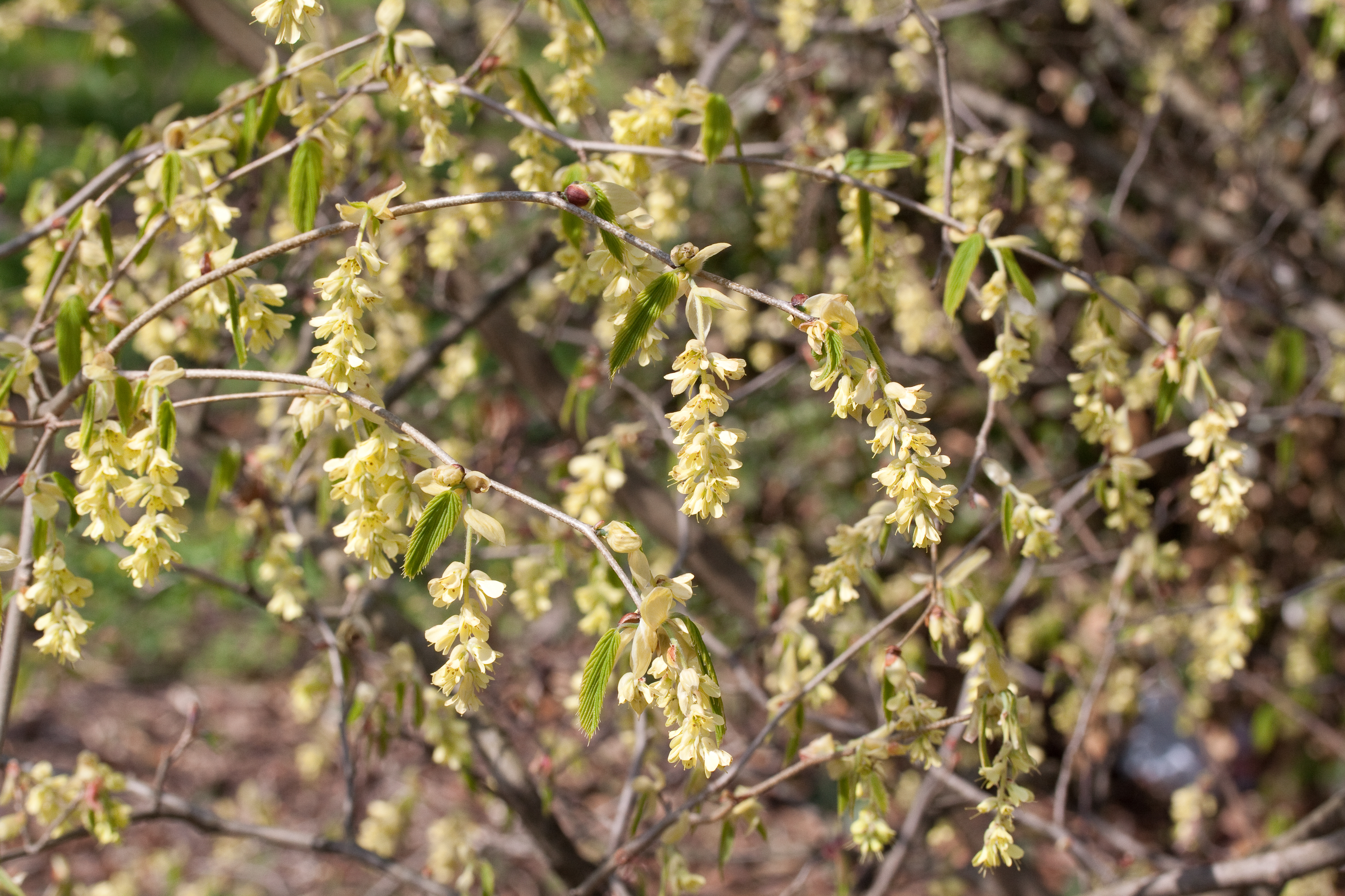 Floraisons de Corylopsis glabrescens - Jardin botanique de Strasbourg - France